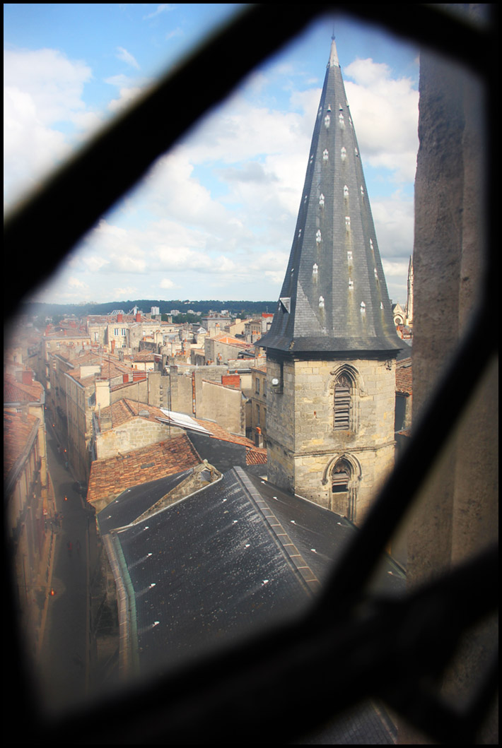 L'église Saint-Eloi de Bordeaux, vue de l'intérieur la Grosse Cloche